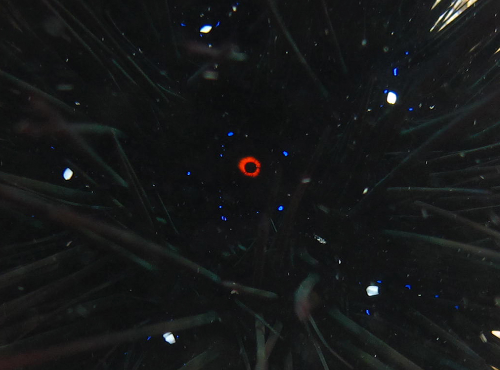 Gros-plan sur l'apex de la face aborale (supérieure) d'un oursin-diadème de l'Indo-Pacifique (Diadema setosum) très caractéristique, observé à la Réunion. On note la papille anale ourlée d'un cercle orange, et les cinq taches blanches sur les gonopores, reliées par des iridophores bleutés. Les reflets des piquants sont légèrement vert métallisé, ce qui est un autre caractéristique typique.